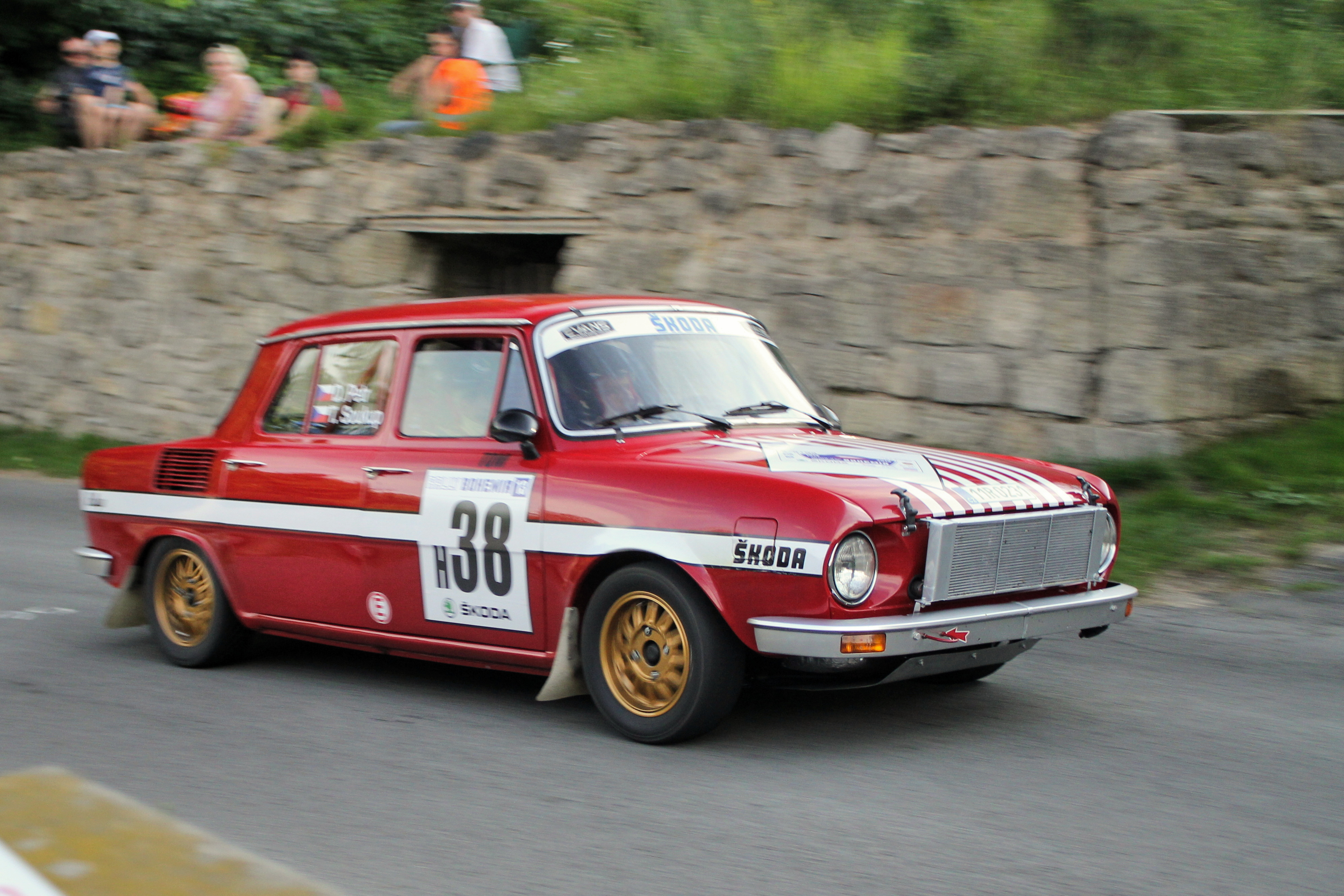 Škoda 100 (gr. 2), Rally Bohemia Legend 2013